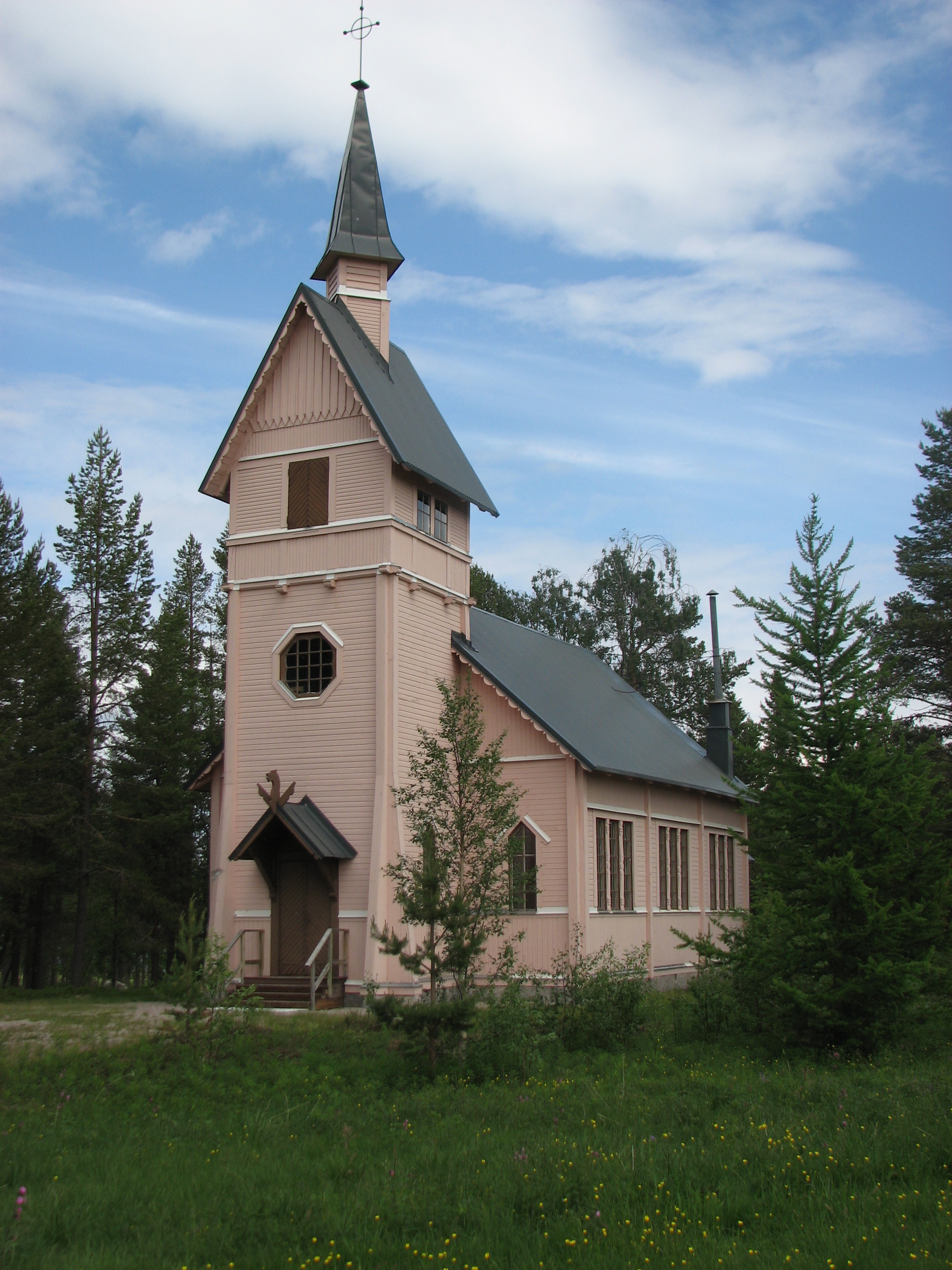 Södra Bergnäs church, Norrbotten, Sweden